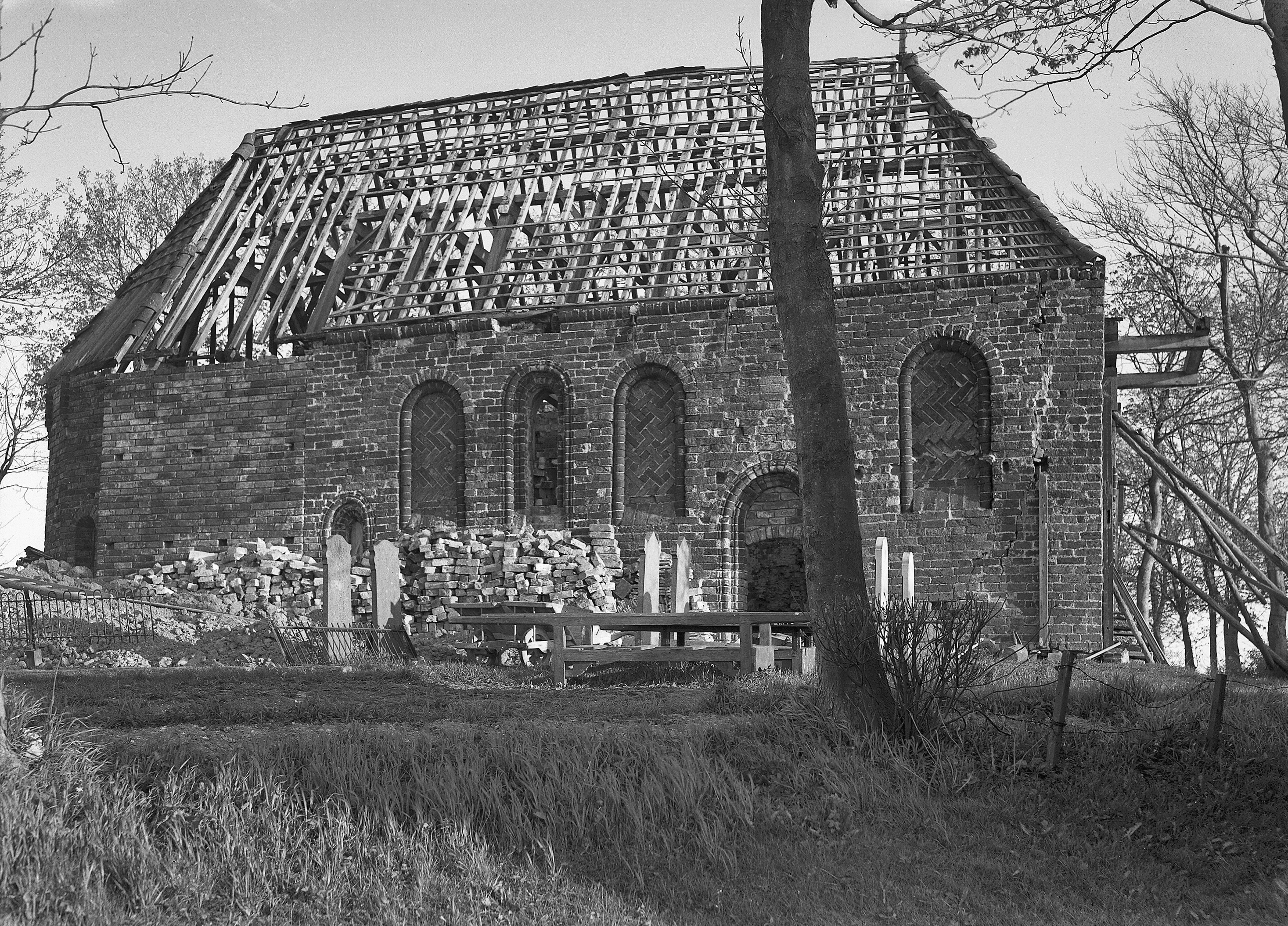 N.H.Kerk: noord muur